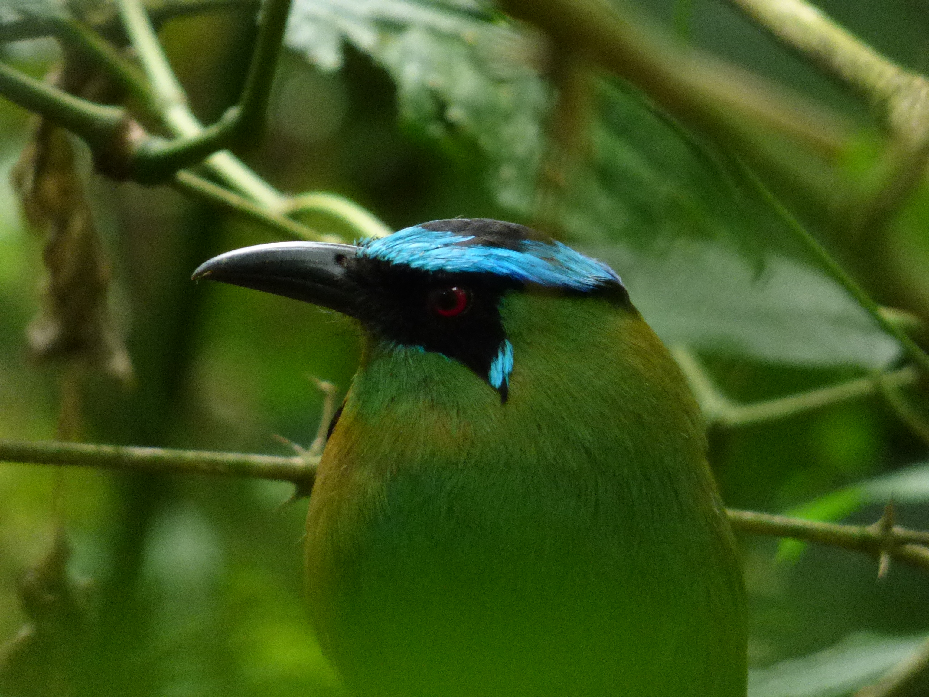 Momots aequatorialis (Barranquero)